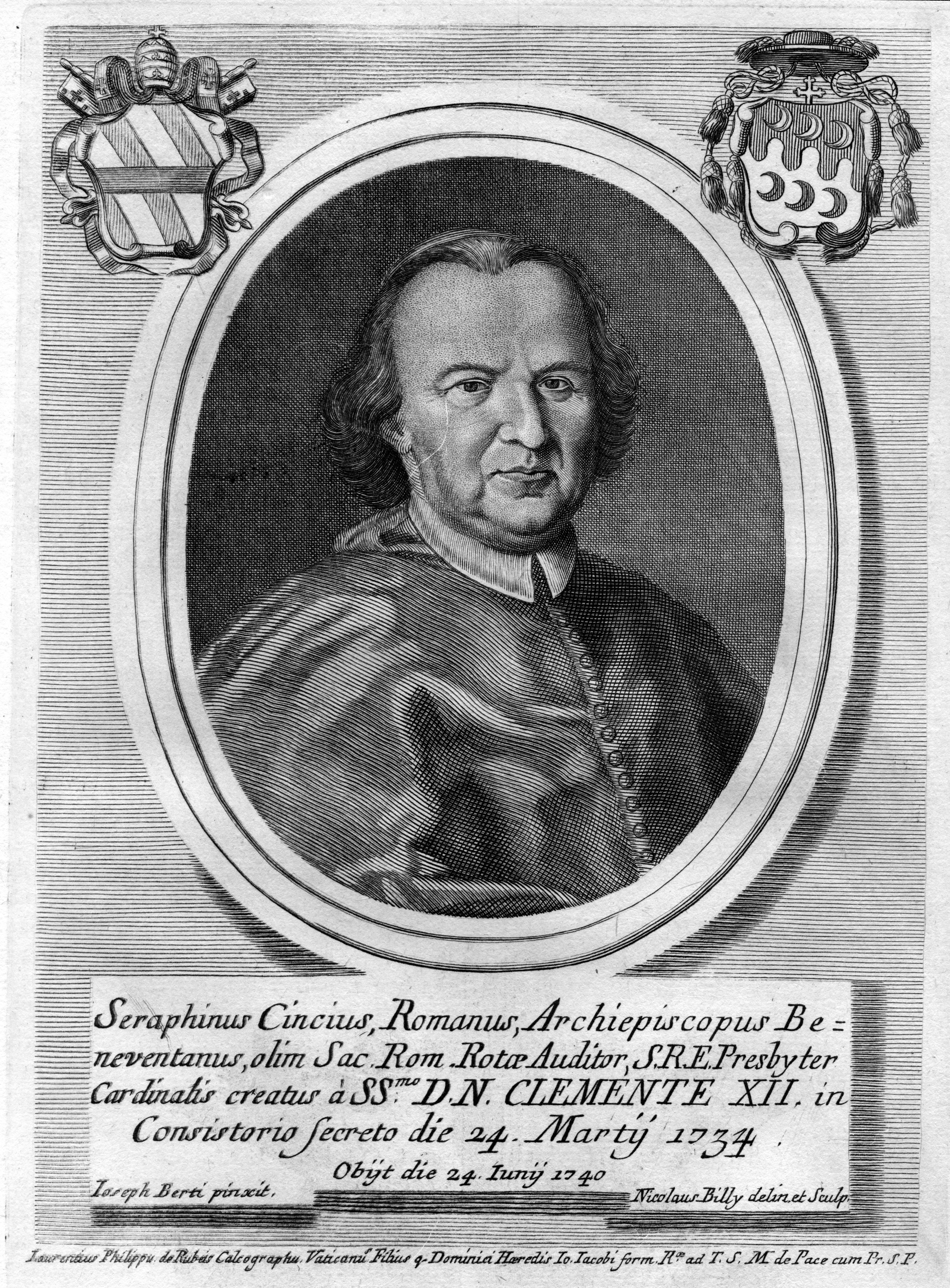 Portrait de Serafino Cenci (1676-1740)